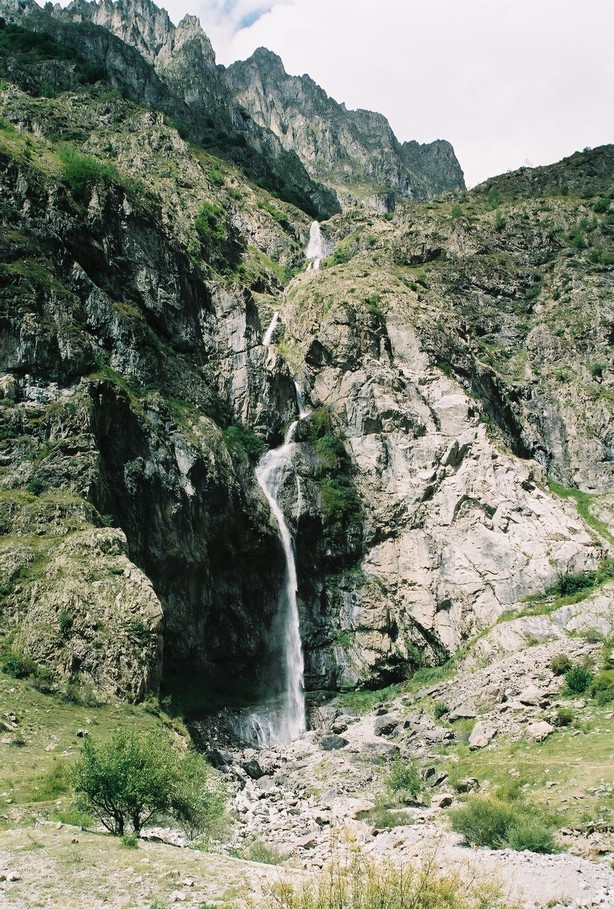 La cascade du Casset, en Valgaudemar